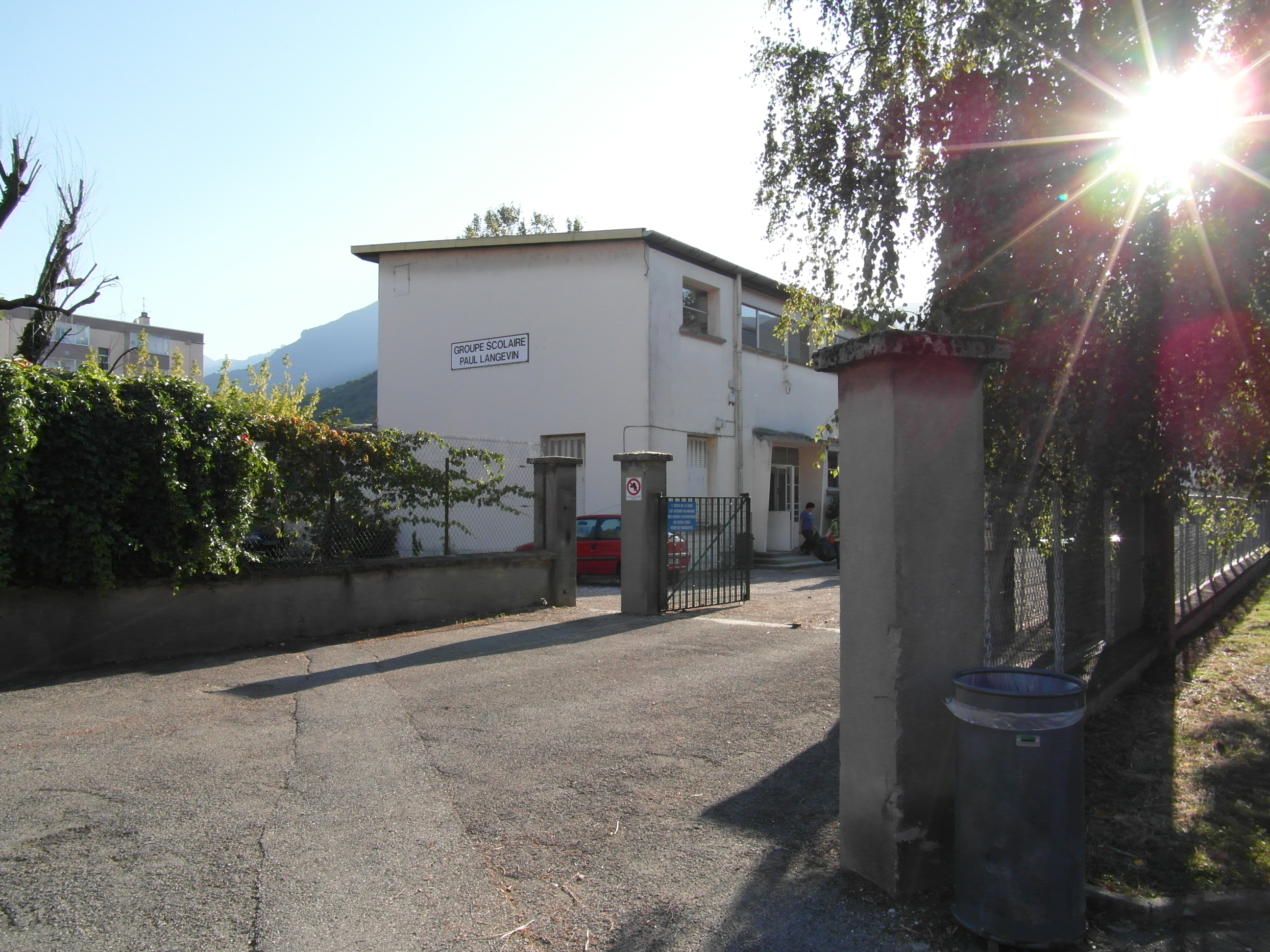 école paul langevin